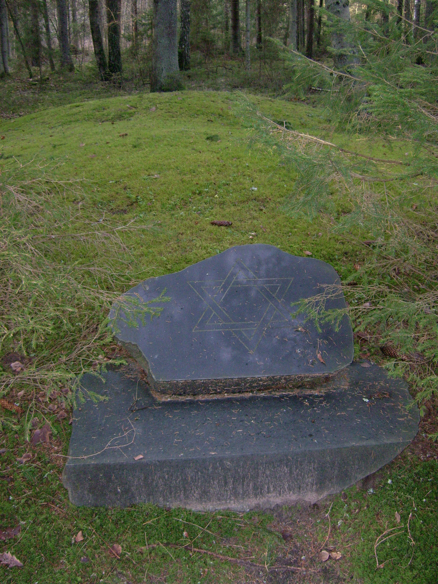 Antišunijai. Paminklas šalia kito žydų kapo